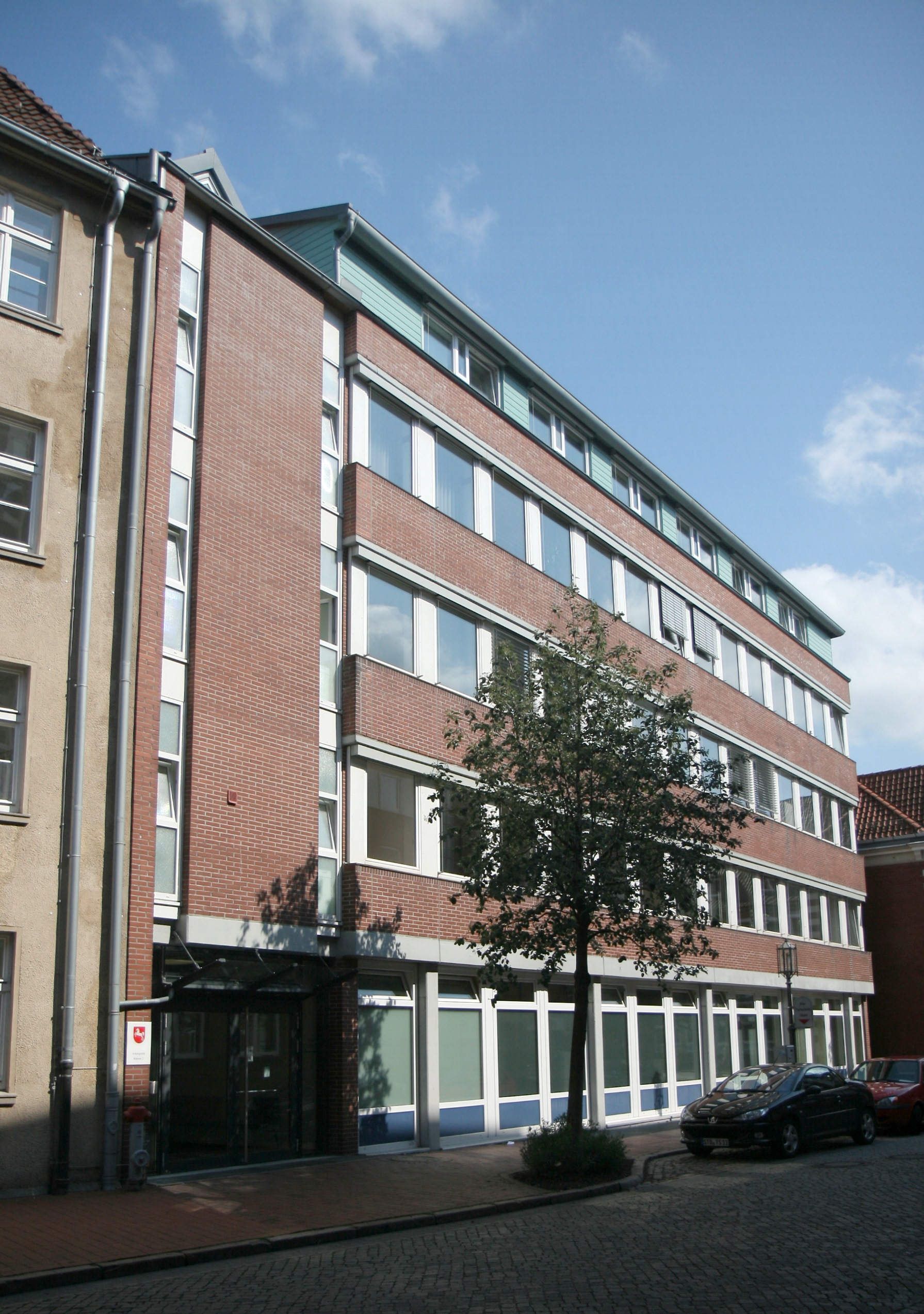 Gebäude des Arbeitsgerichts Stade, Ritterstraße 2 in Stade.